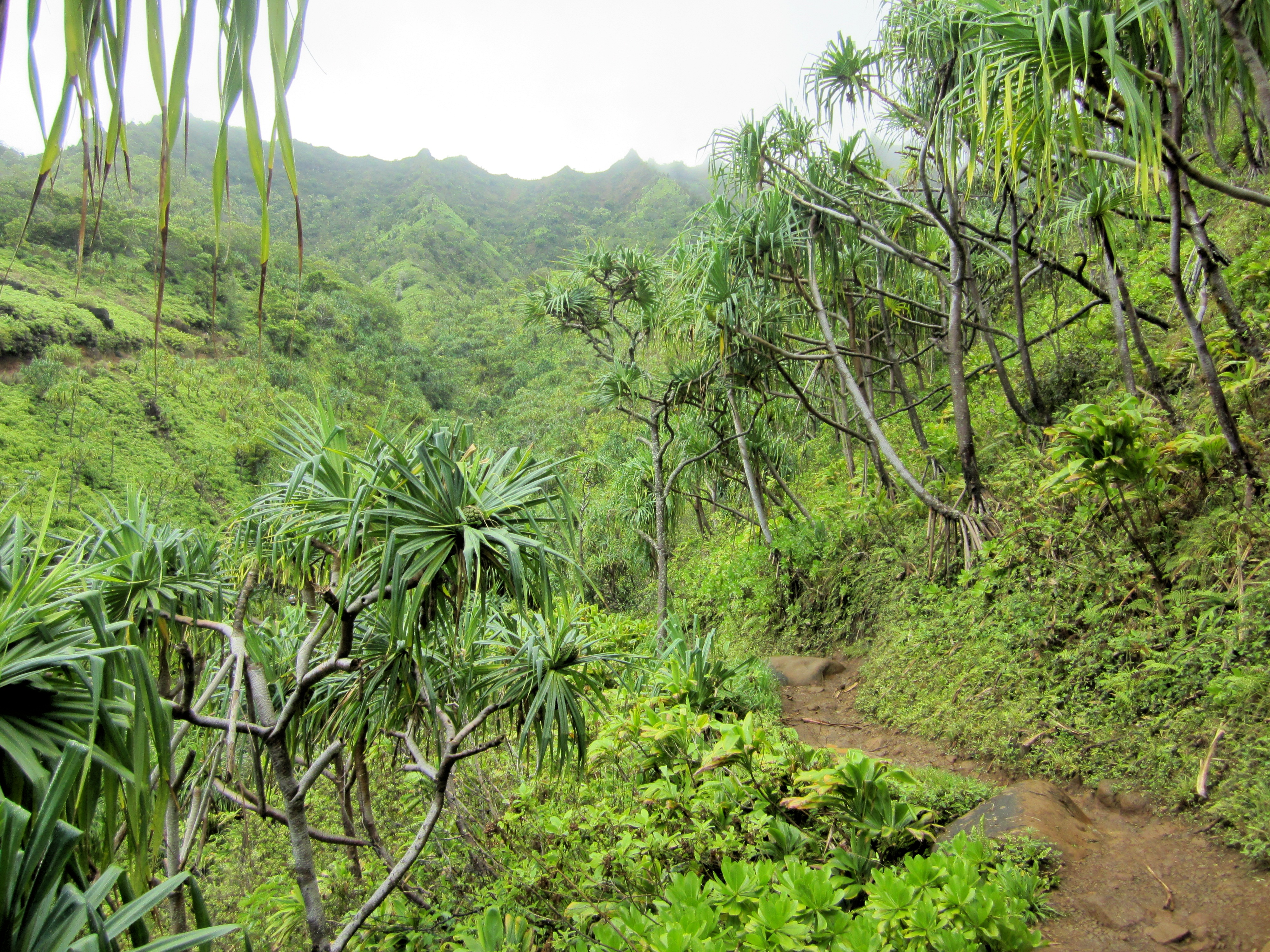 Diese Aufnahme ist während einer Wanderung im Norden Kauais entstanden.